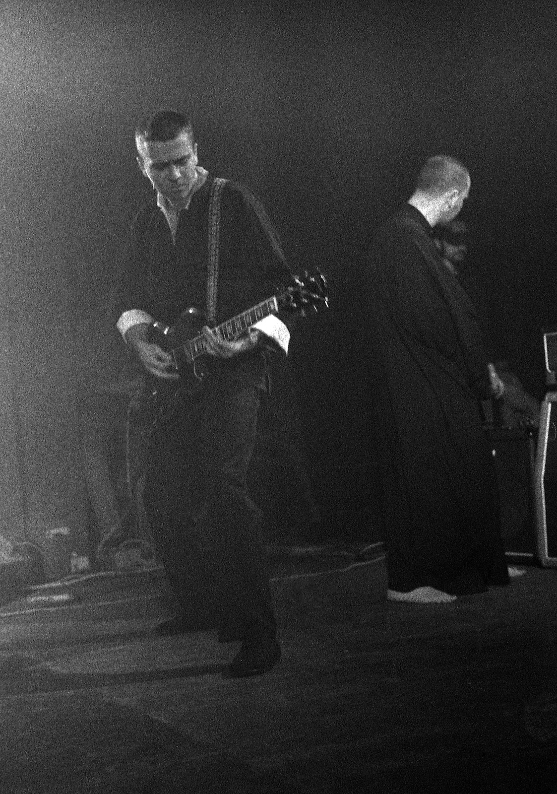 Предраг Дабић на сцени са Бјесовима, Дом омладине Београда 1995. Снимио Ранко Томић. Ранко (разговор) 11:08, 20. јун 2016. (CEST)